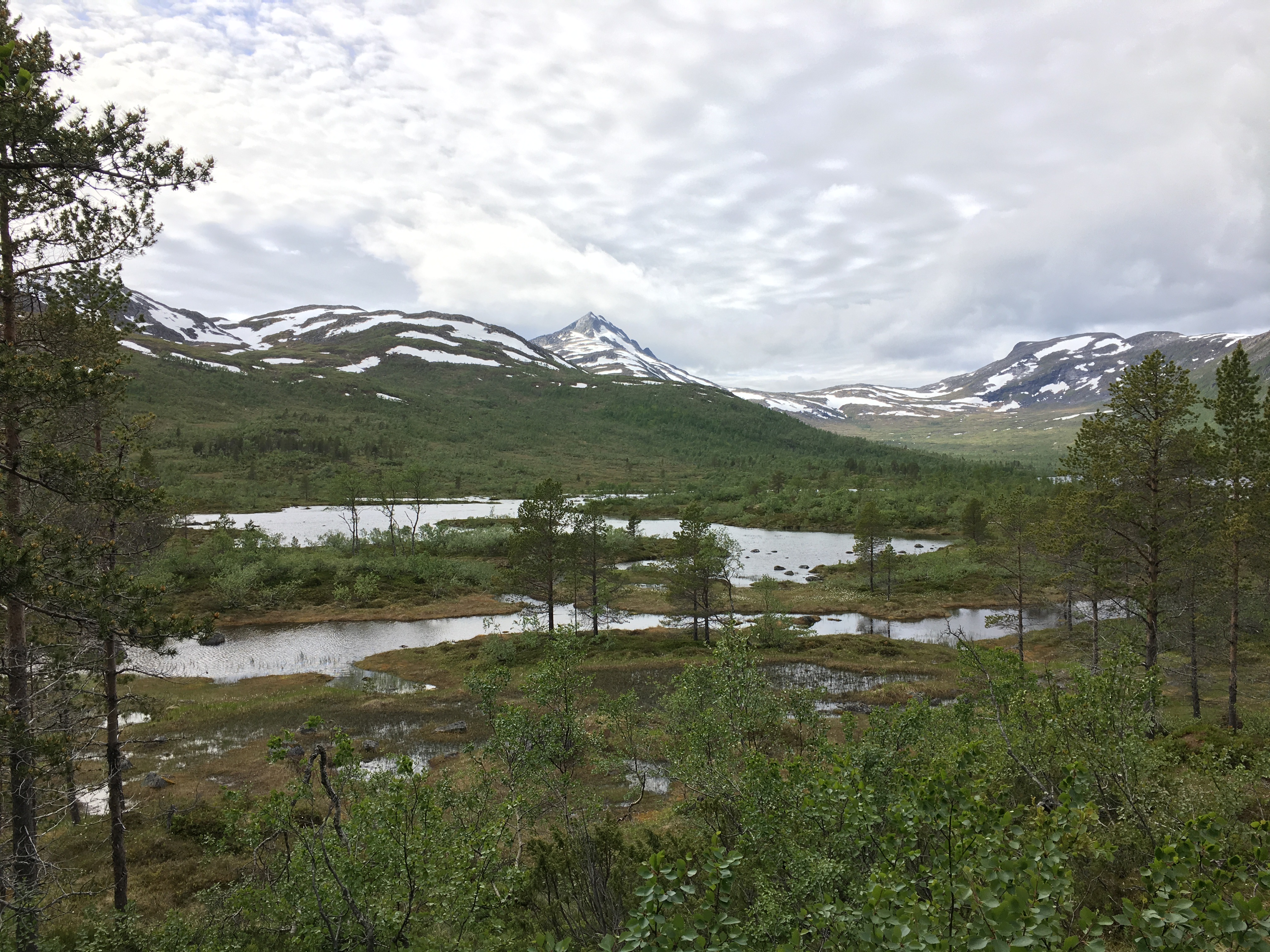 Utsyn mot Åndervatnet i Ånderdalen nasjonalpark.